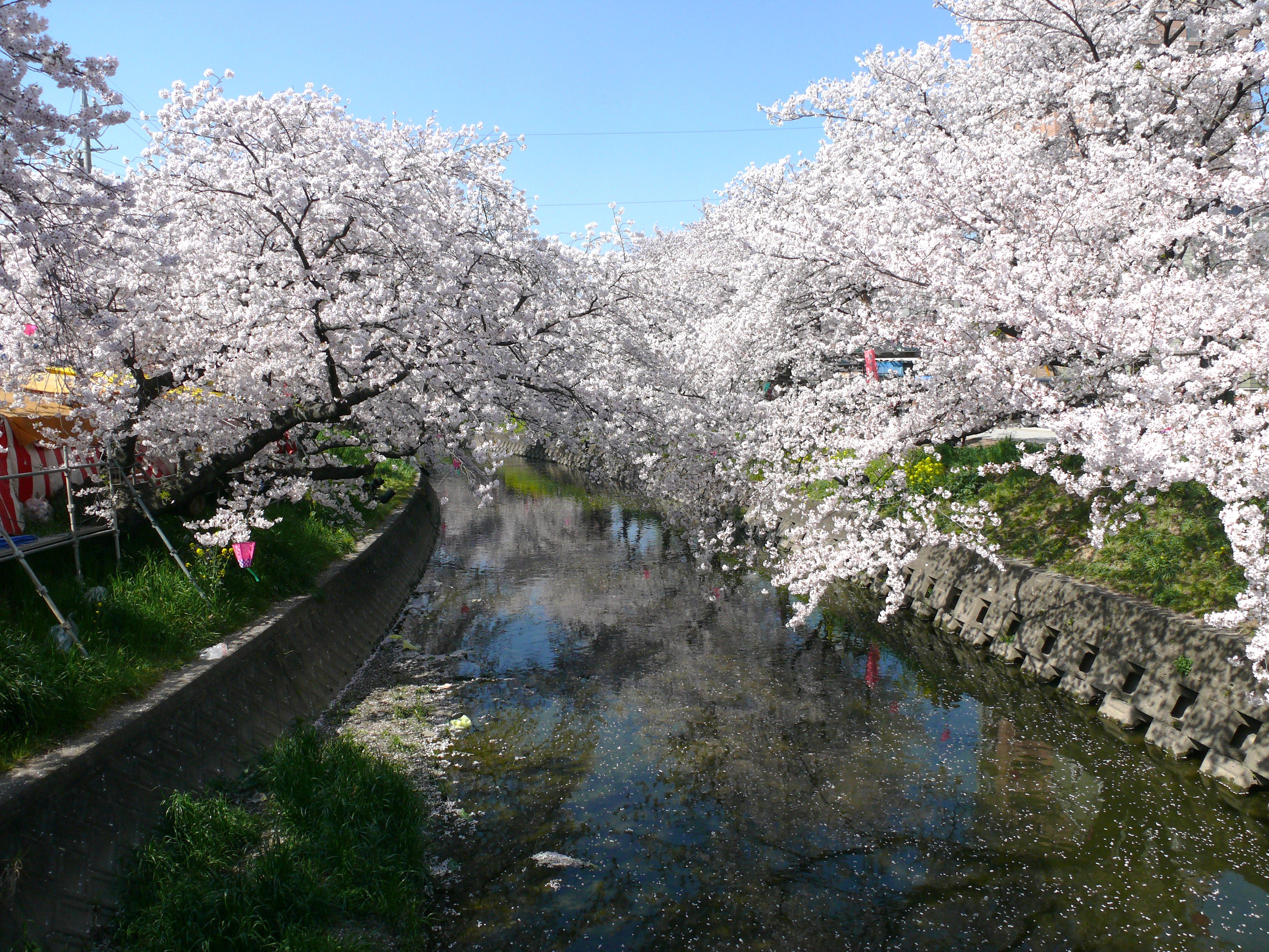 愛知県岩倉市。真光橋付近の五条川。